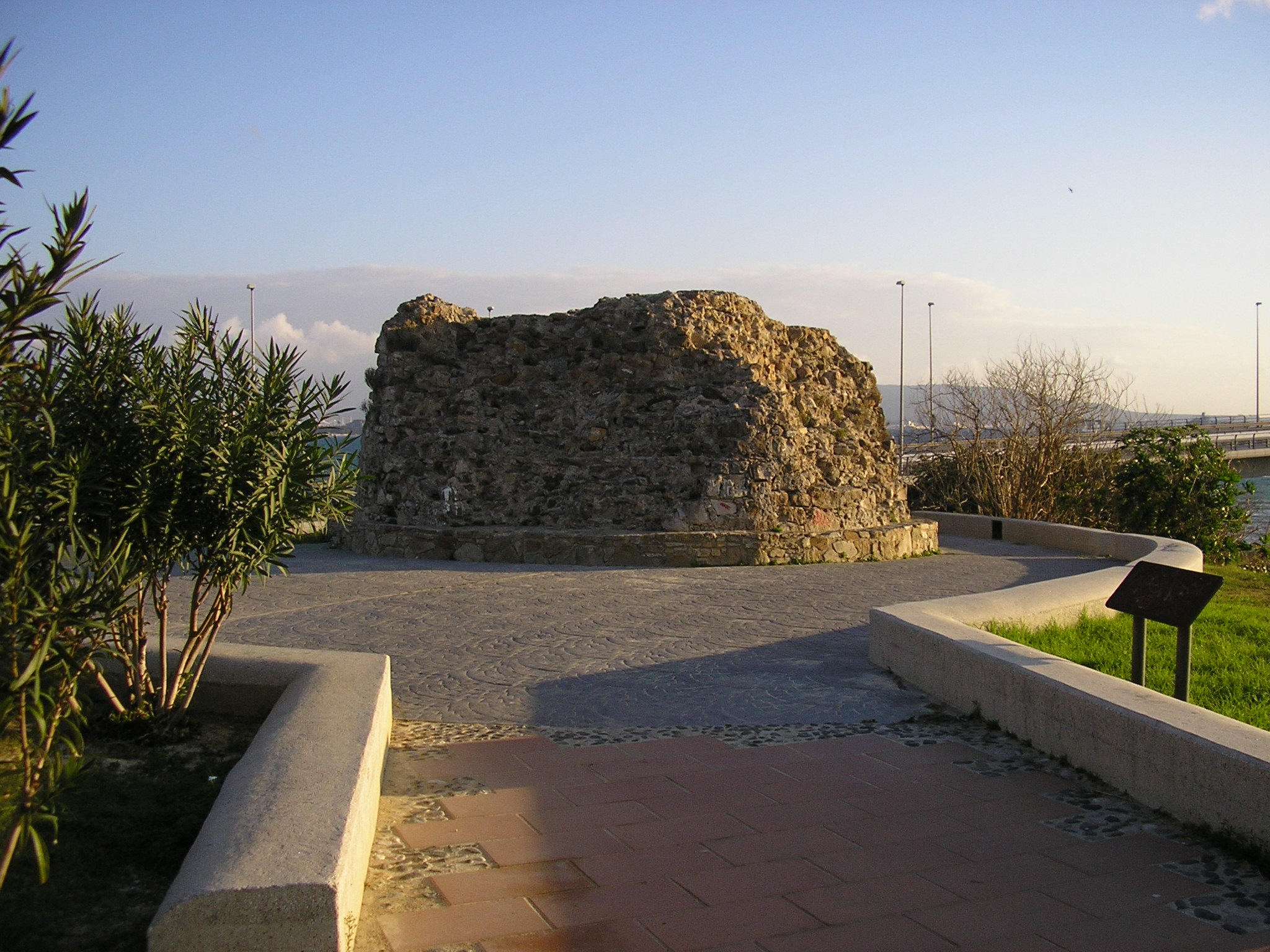 Torre del Almirante de Algeciras, Andalucía, España.